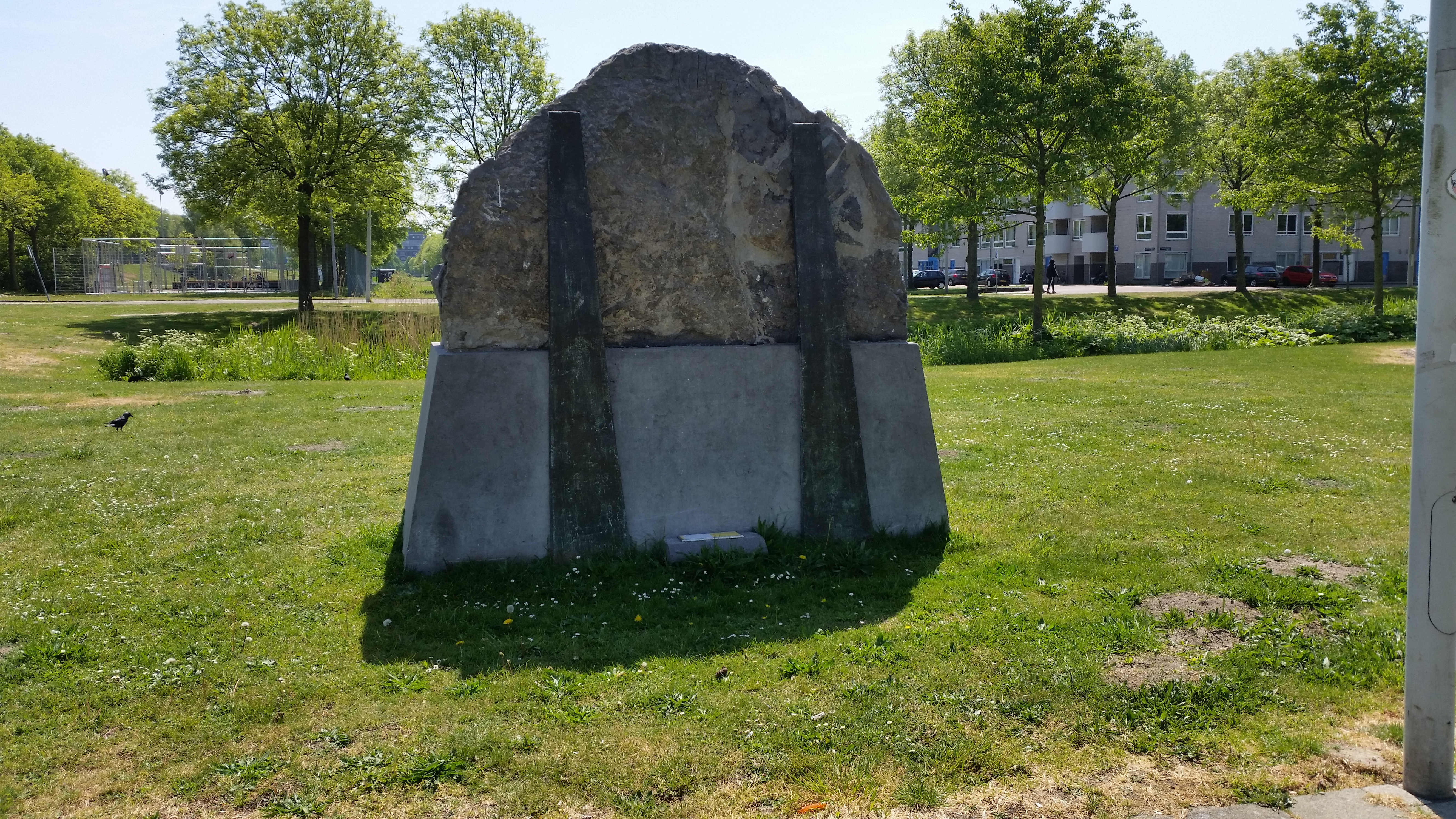 Impressie van Maria Planeta Citta van Evert van Kooten Niekerk (mei 2020)